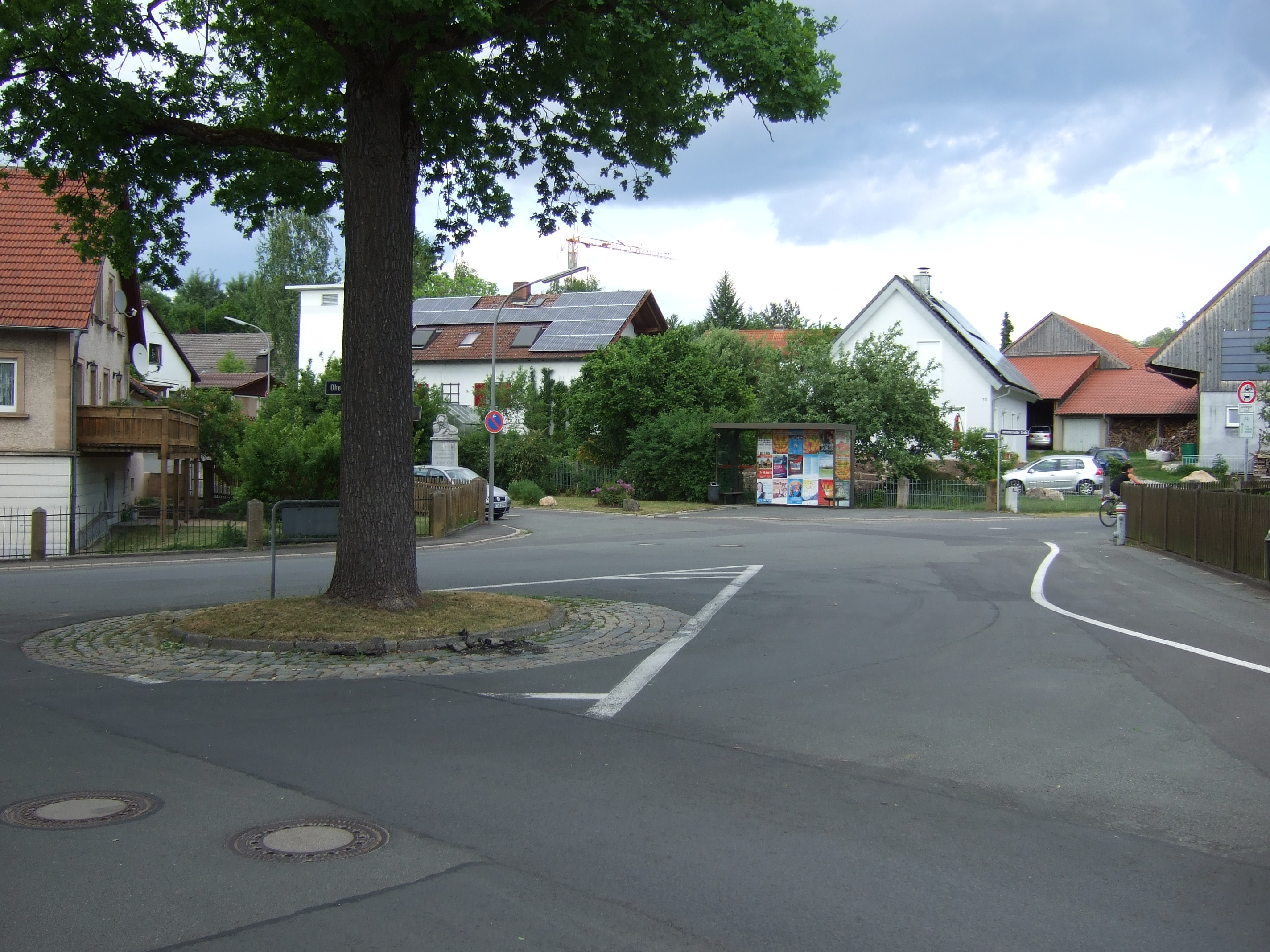 Oberkonnersreuther Straße Bayreuth